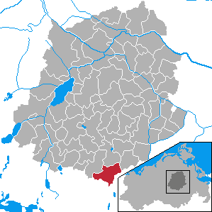 Mölln, Landkreis Demmin, Mecklenburg-Vorpommern